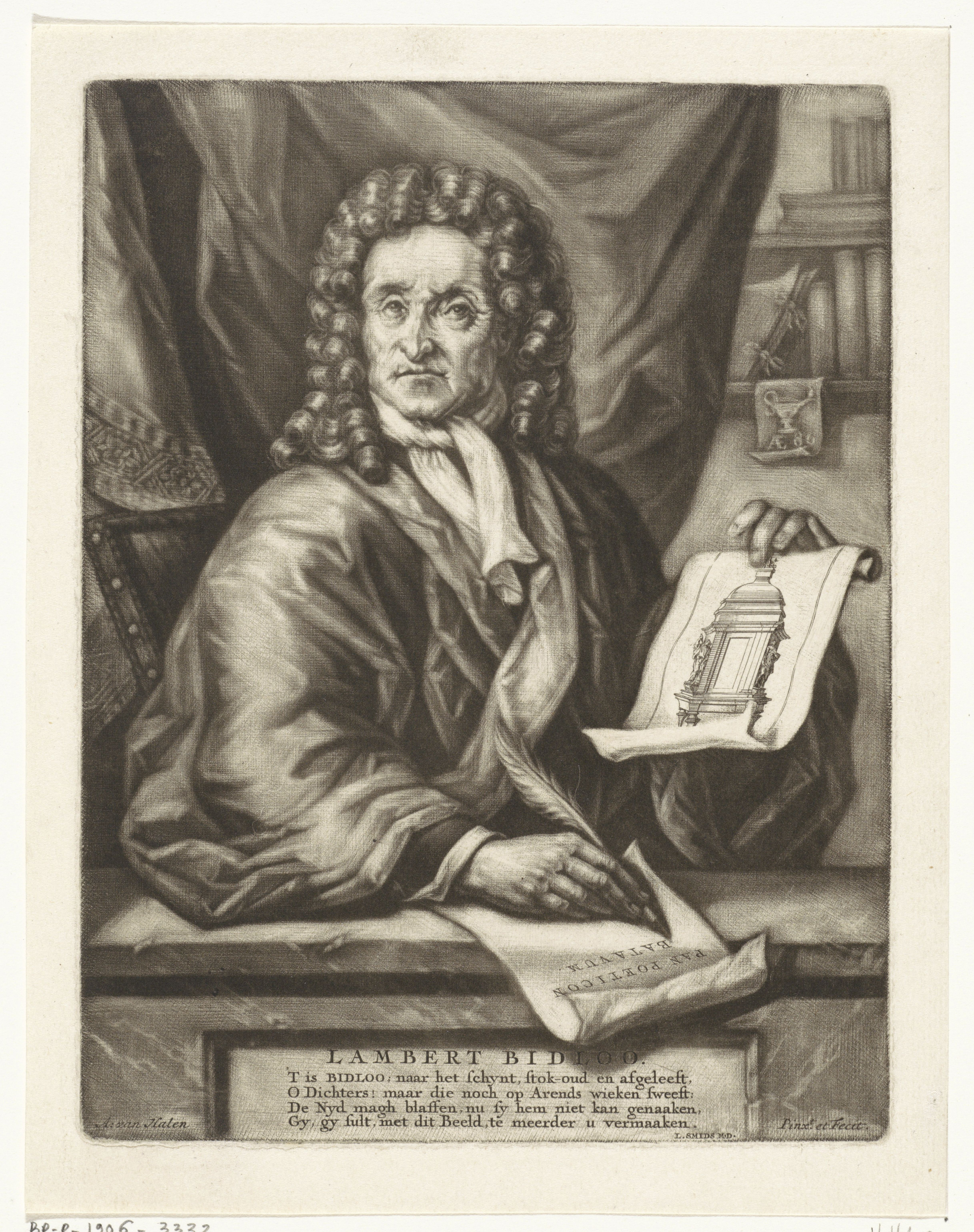 IdentificatieTitel(s): Portret van Lambert BidlooObjecttype: prent Objectnummer: RP-P-1906-3332Catalogusreferentie: Hollstein Dutch 2Opschriften / Merken: verzamelaarsmerk, verso, gestempeld: Lugt 2228Omschrijving: De schrijver en dichter Lambert Bidloo op 86-jarige leeftijd. In de linkerhand een prent en in de andere hand een schrijfveer. Onder zijn hand het titelblad van zijn gedicht 'Panpoëticon Batavum'.VervaardigingVervaardiger: prentmaker: Arnoud van Halen (vermeld op object)schrijver: Ludolph Smids (vermeld op object)Plaats vervaardiging: AmsterdamDatering: 1720 - 1732Fysieke kenmerken: mezzotint en gravureMateriaal: papier Techniek: mezzotint / graveren (drukprocedé)Afmetingen: plaatrand: h 165 mm × b 142 mmOnderwerpWat: portrait of a writerprint, e.g.: engraving, etching, lithographWie: Lambert BidlooVerwerving en rechtenVerwerving: aankoop 1906Copyright: Publiek domein